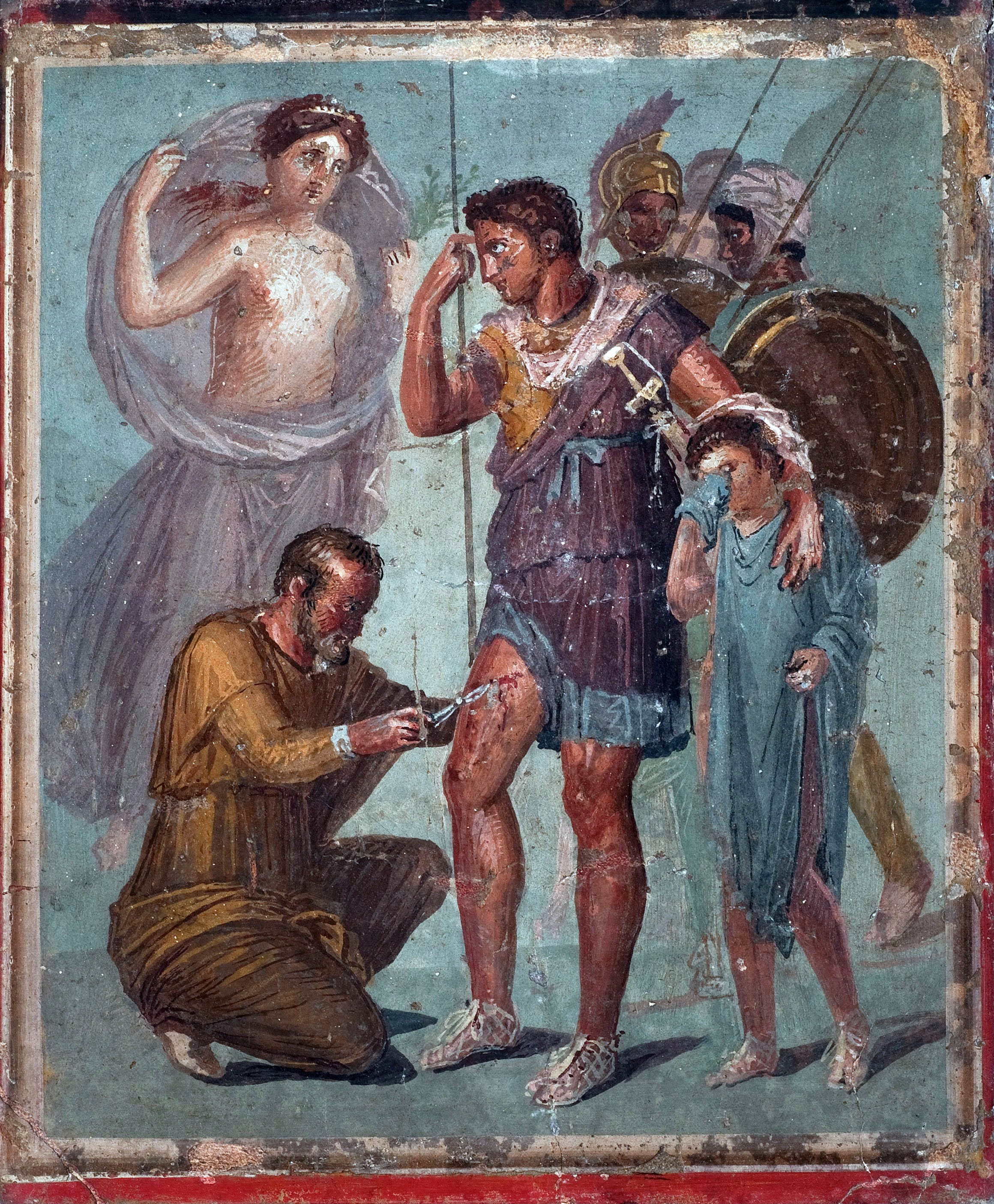 Museo Archeologico Nazionale di Napoli (inv. nr. 9009). Da Pompeii, Casa di Sirico - Enea ferito, in piedi, viene curato dal medico Japix, mentre Venere, preoccupata, giunge portando erbe medicamentose; intanto il figlio Ascanio, in lacrime, è presso il padre. 1st Century A.D. fresco from Pompeii (now in the Museo Archeologico Nazionale (Naples)), showing Iapyx removing an arrowhead from the leg of Aenas, with Aenas's son Iulus Ascanius crying beside his father. At left, Aeneas' mother, the goddess Venus (the Greek Aphrodite).